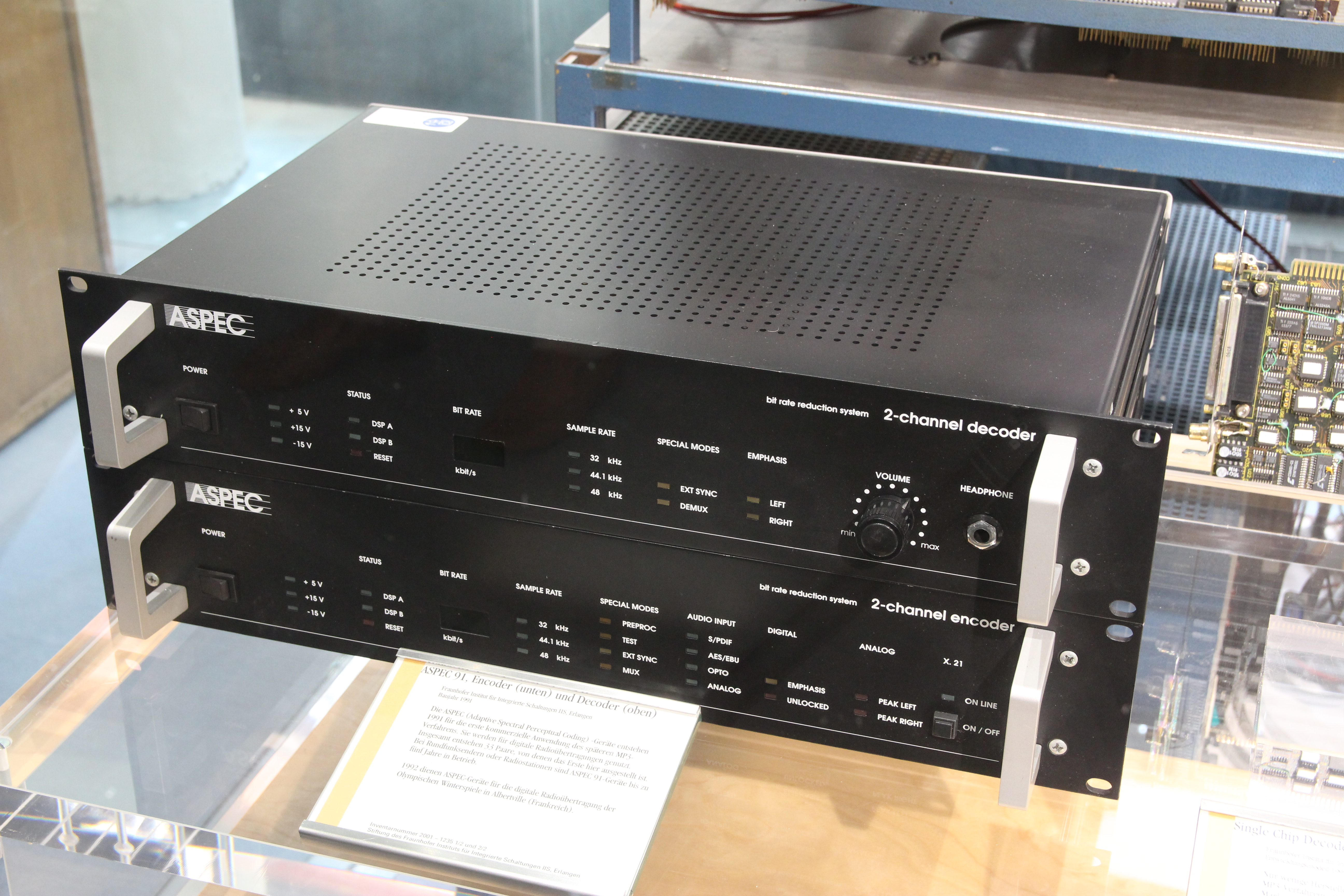 ASPEC 91 (Adaptive Spectral Perceptual Coding, aus dem Jahr 1991) vom Fraunhofer Institut Erlangen, unten Encoder und oben Decoder. Dies ist das erste von insgesamt 33 Paaren, die man gebaut hat. Gerät für die kommerzielle Anwendung des späteren MP3-Verfahrens. Ausstellungsstück im Deutschen Museum Bonn.